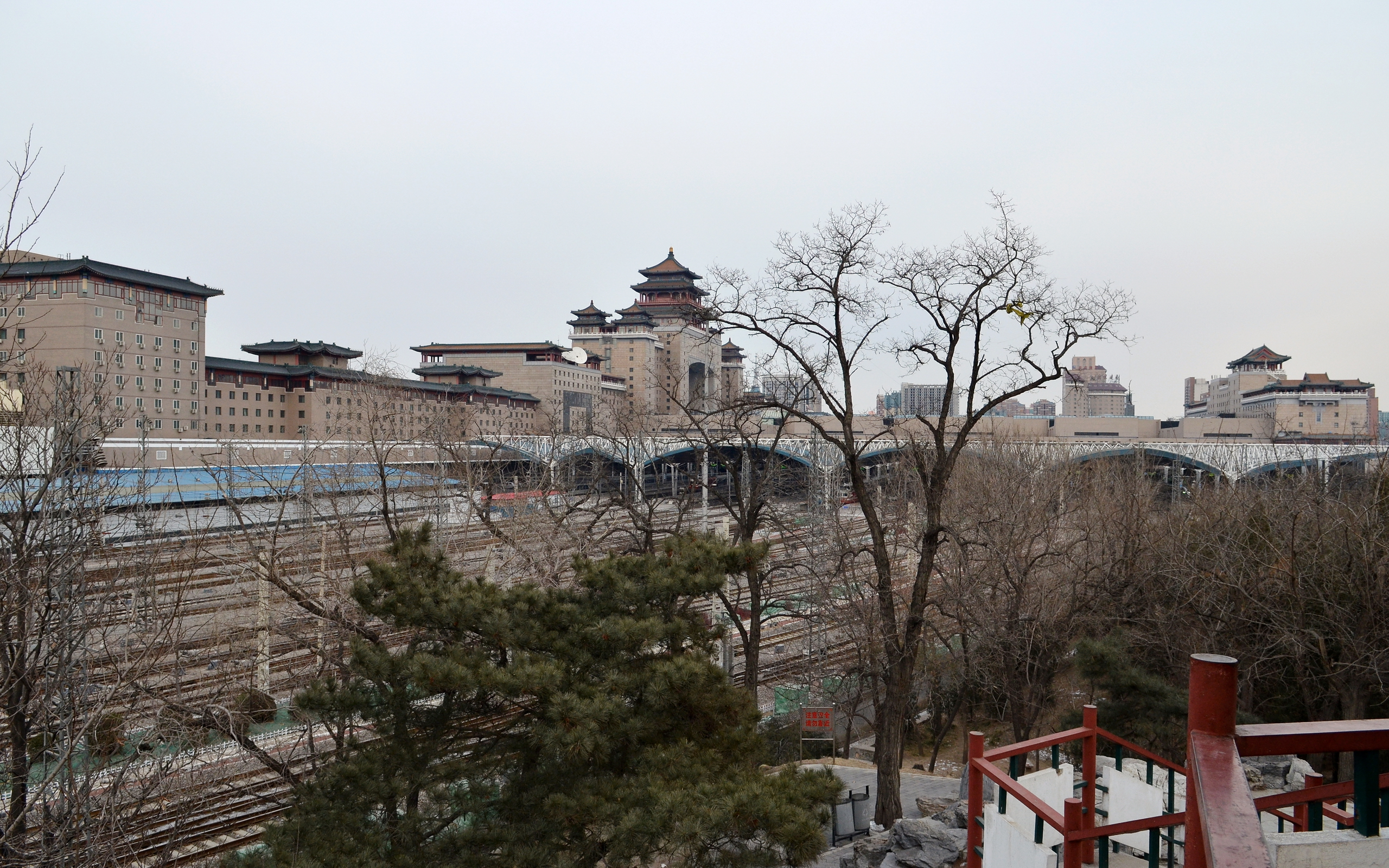 中文（中国大陆）: 由莲花池公园眺望北京西客站